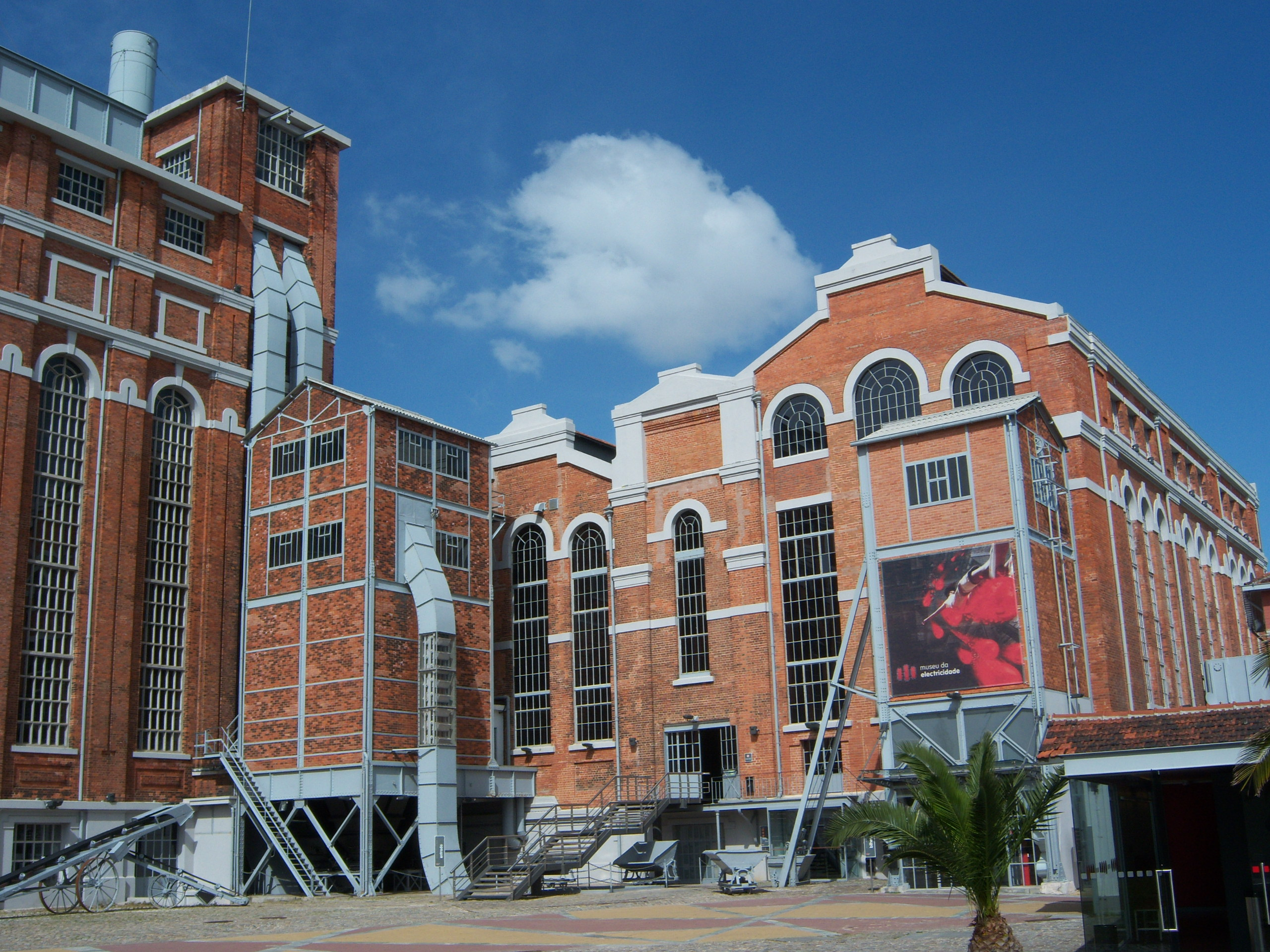 Praça do Carvão, o centro nevrálgico do museu e da antiga Central Tejo.